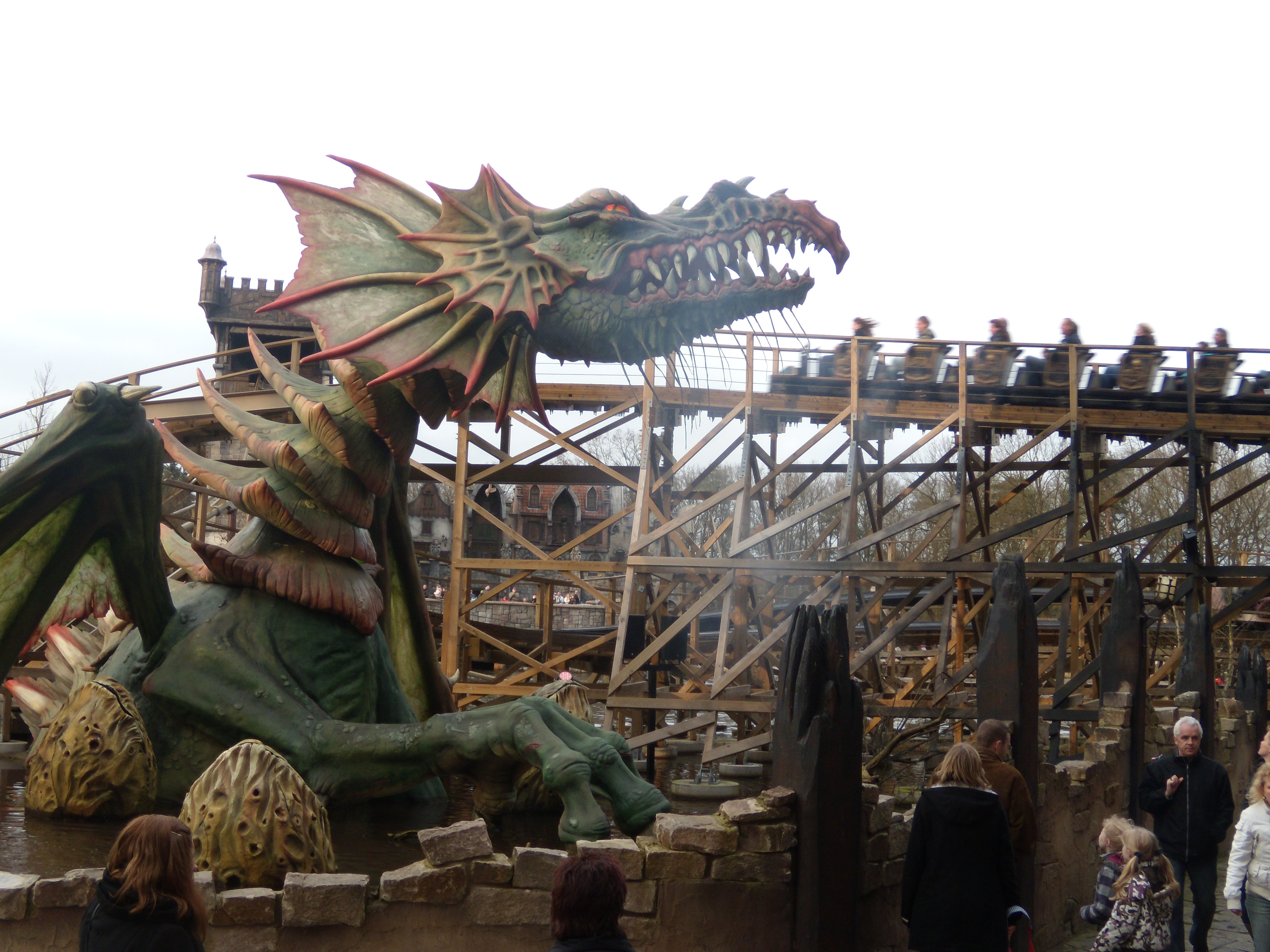 Dragon de la montagnes russes en bois Joris en de Draak situé dans le parc d'attractions néerlandais Efteling.